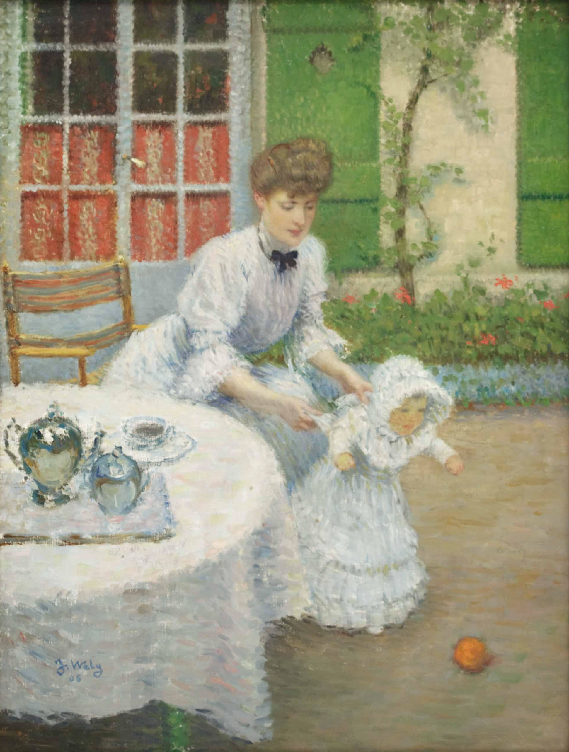 "Junge Mutter mit ballspielendem Mädchen", signiert: J. Wely, datiert: (19)06, Öl auf Leinwand, ca. 62 x 46 cm